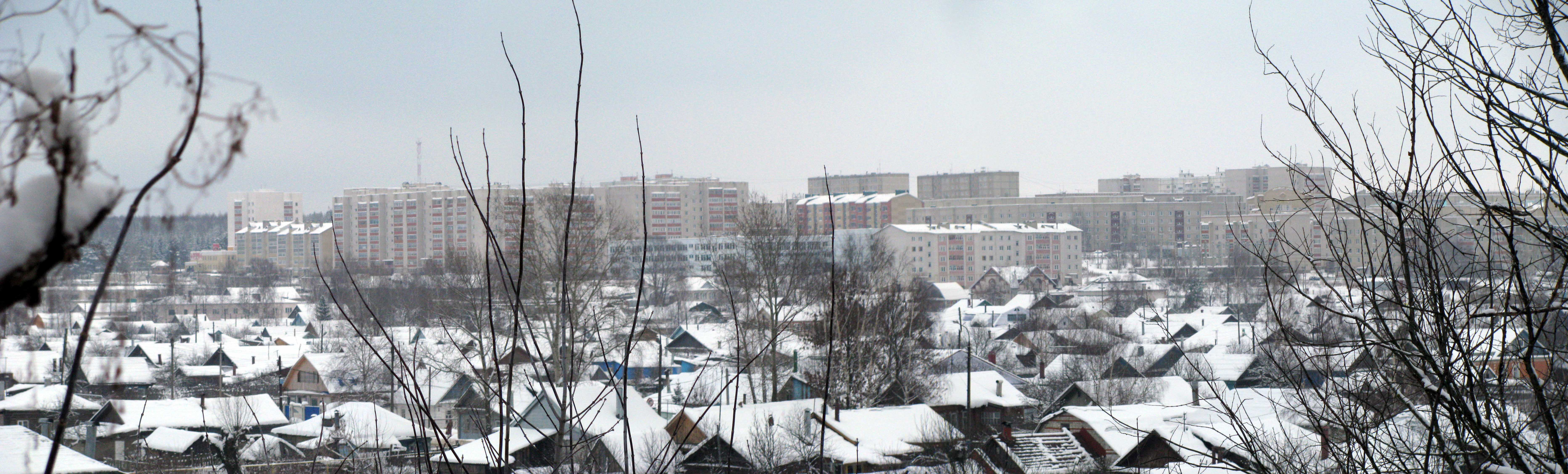 Панорама 11-го микрорайона города Арзамаса.